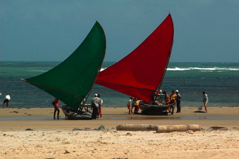 Barche sulla spiaggia